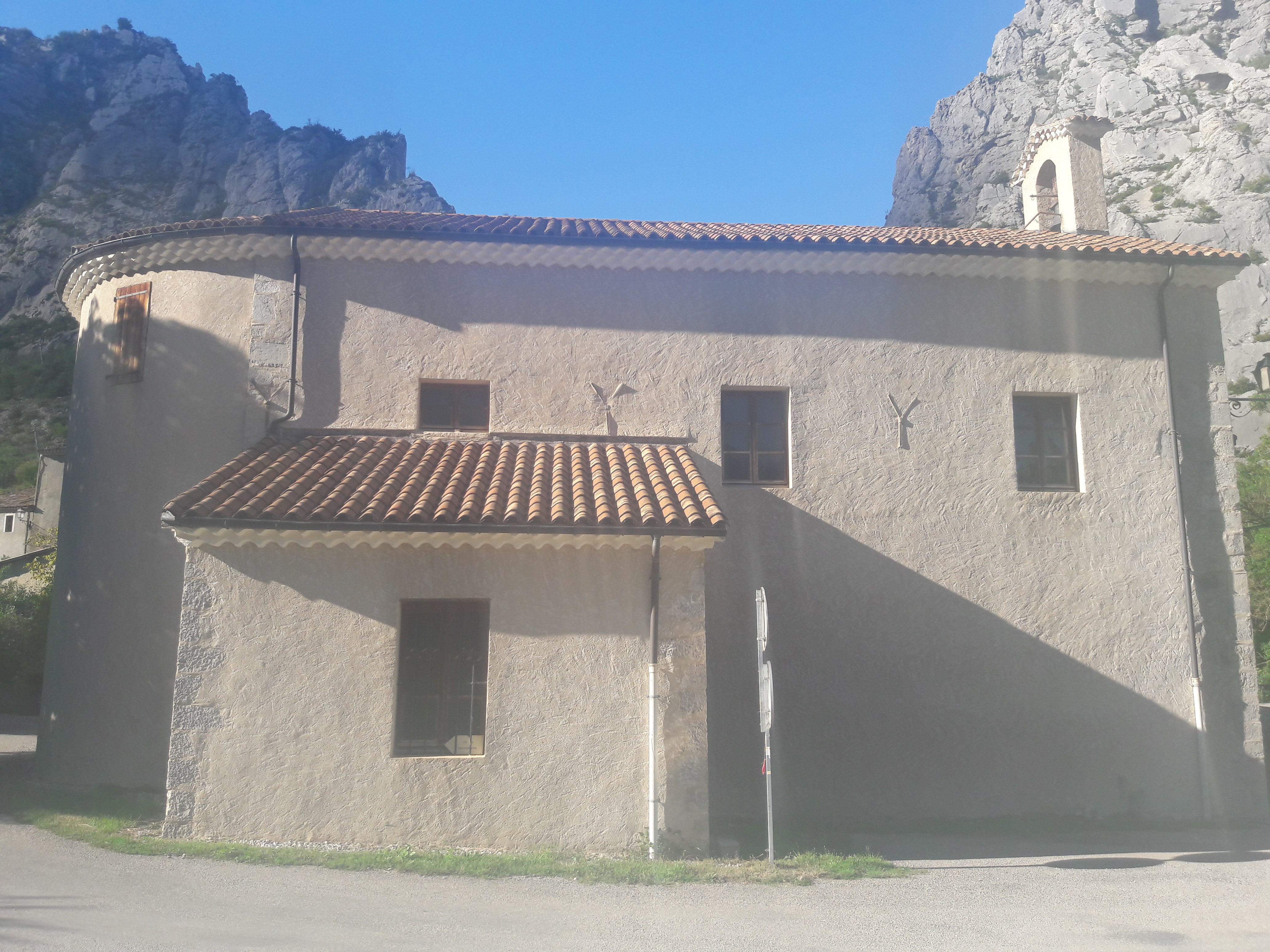 Eglise de Sigottier